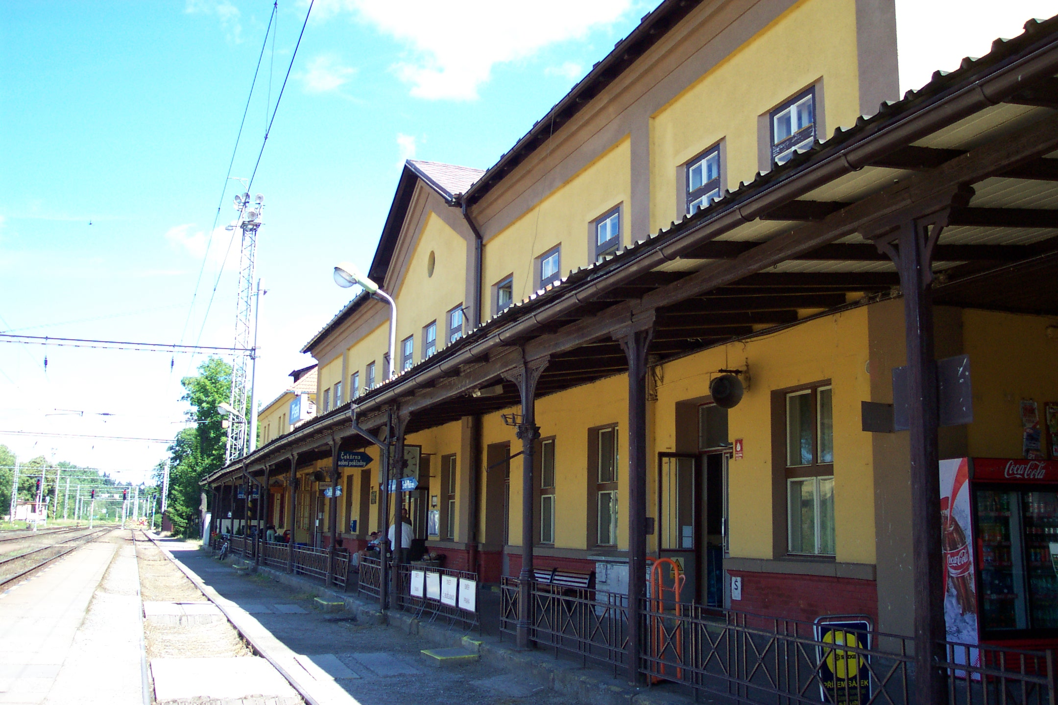 Písek's main rail station - Písecké hlavní nádraží